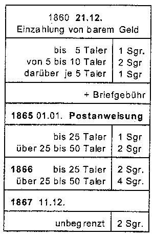 Die Bareinzahlung auf Briefe sind die Vorläufer der Postanweisung